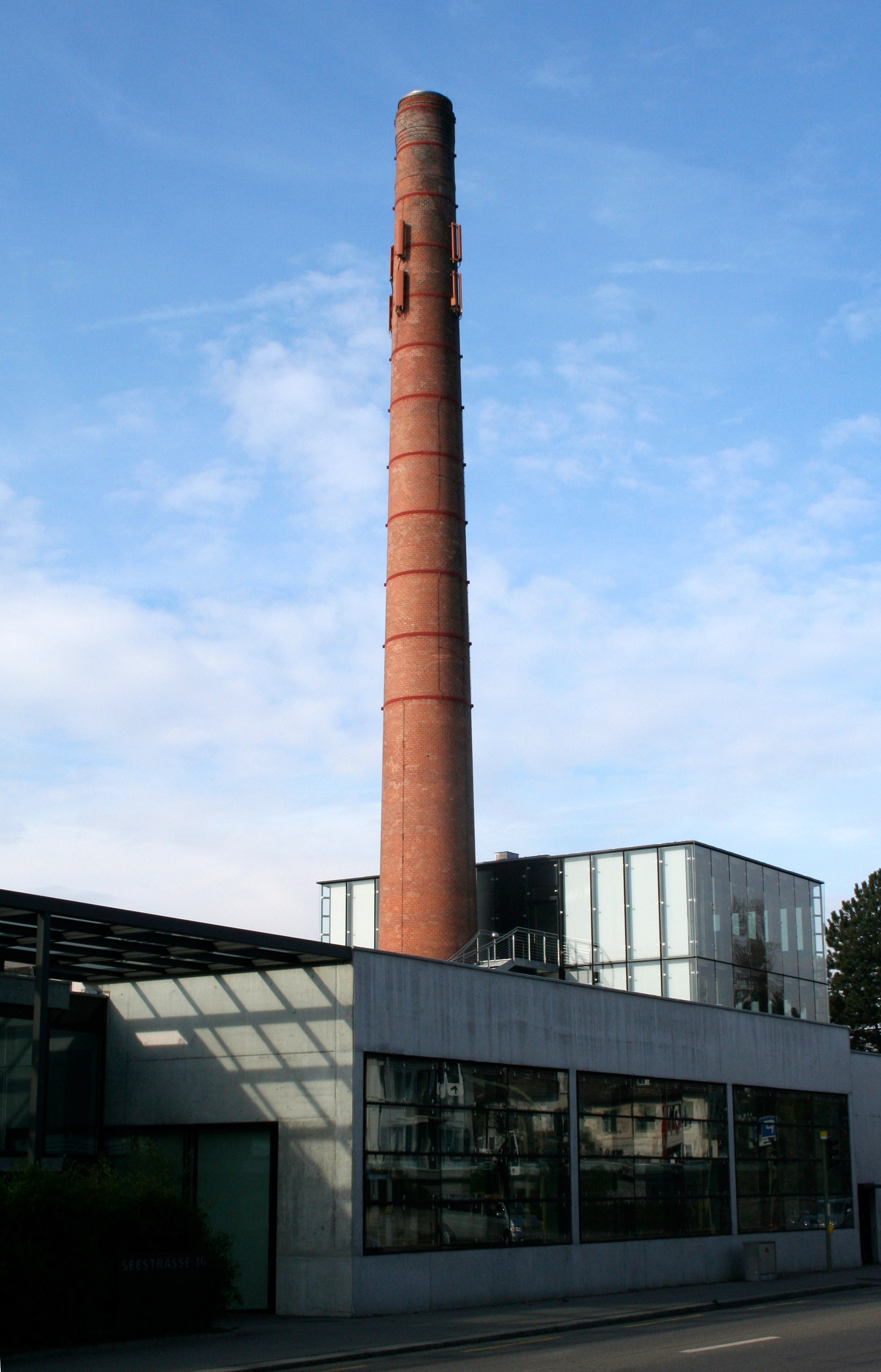 Hochkamin der ehemaligen «Terlinden» in Küsnacht ZH